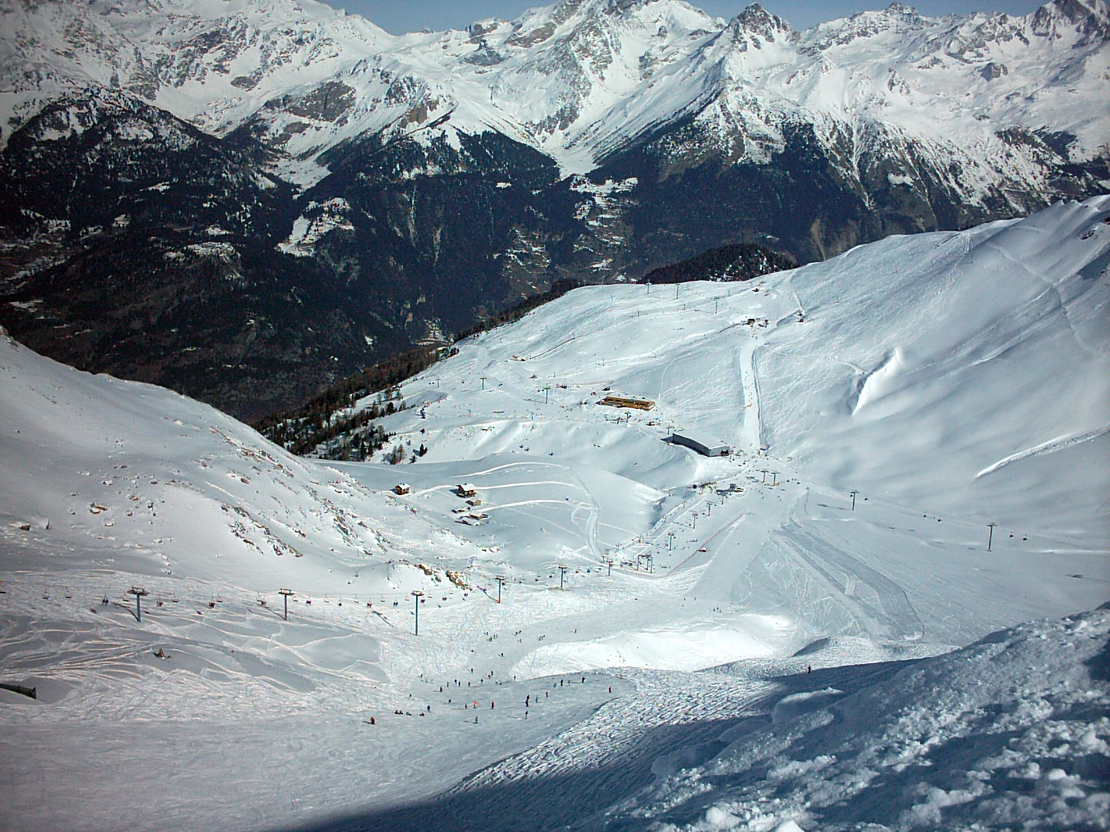 Le plateau d'Arrondaz et les pistes de Valfréjus depuis Punta Bagna. Plus loin la vallée de la Maurienne.